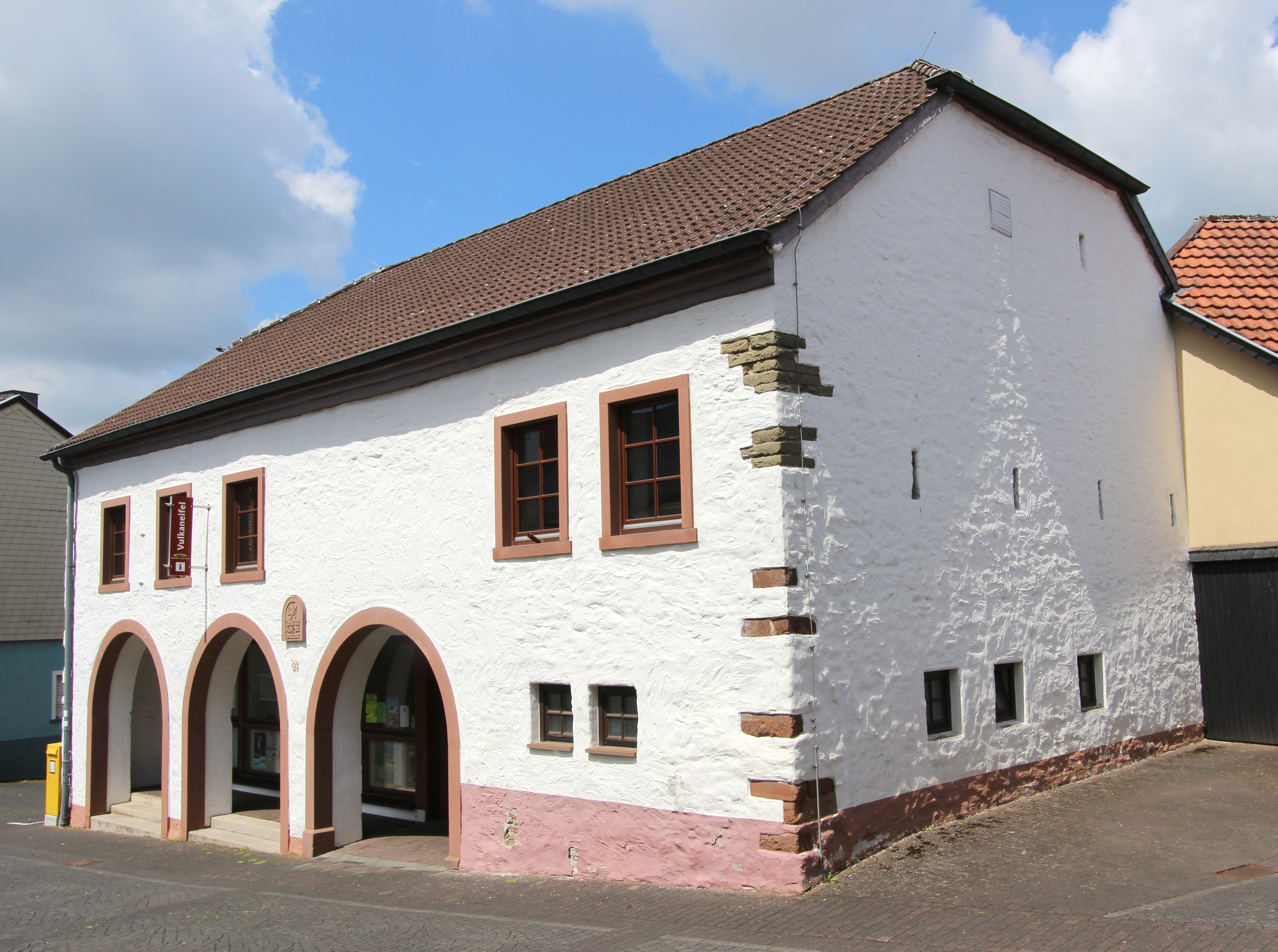 54589 Stadtkyll, Burgberg 22. In der ehemaligen Marktscheune ist heute die "Tourist-Information Oberes Kylltal". Aufnahme von 2017.